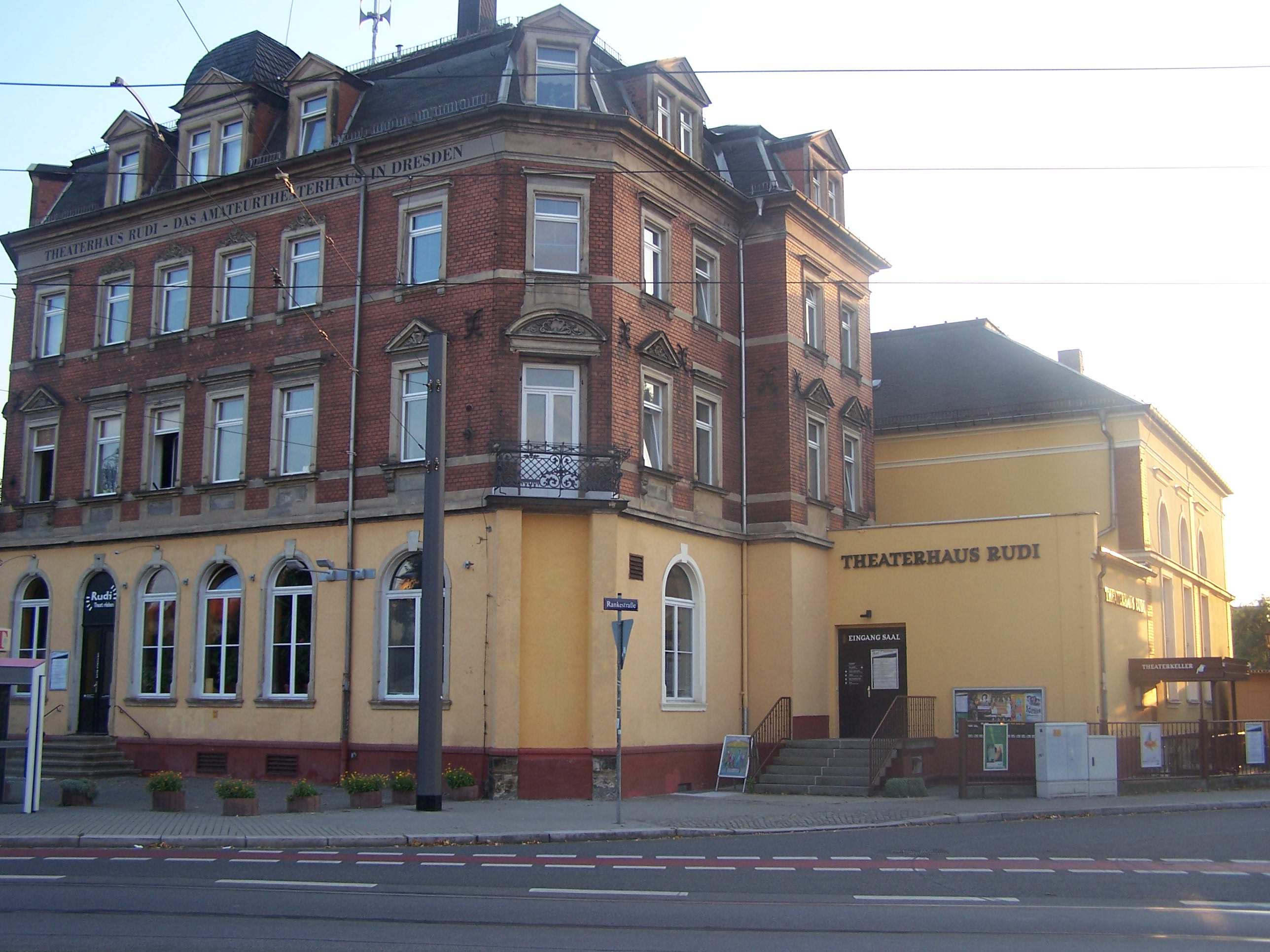 Theaterhaus Rudi in Dresden-Kaditz